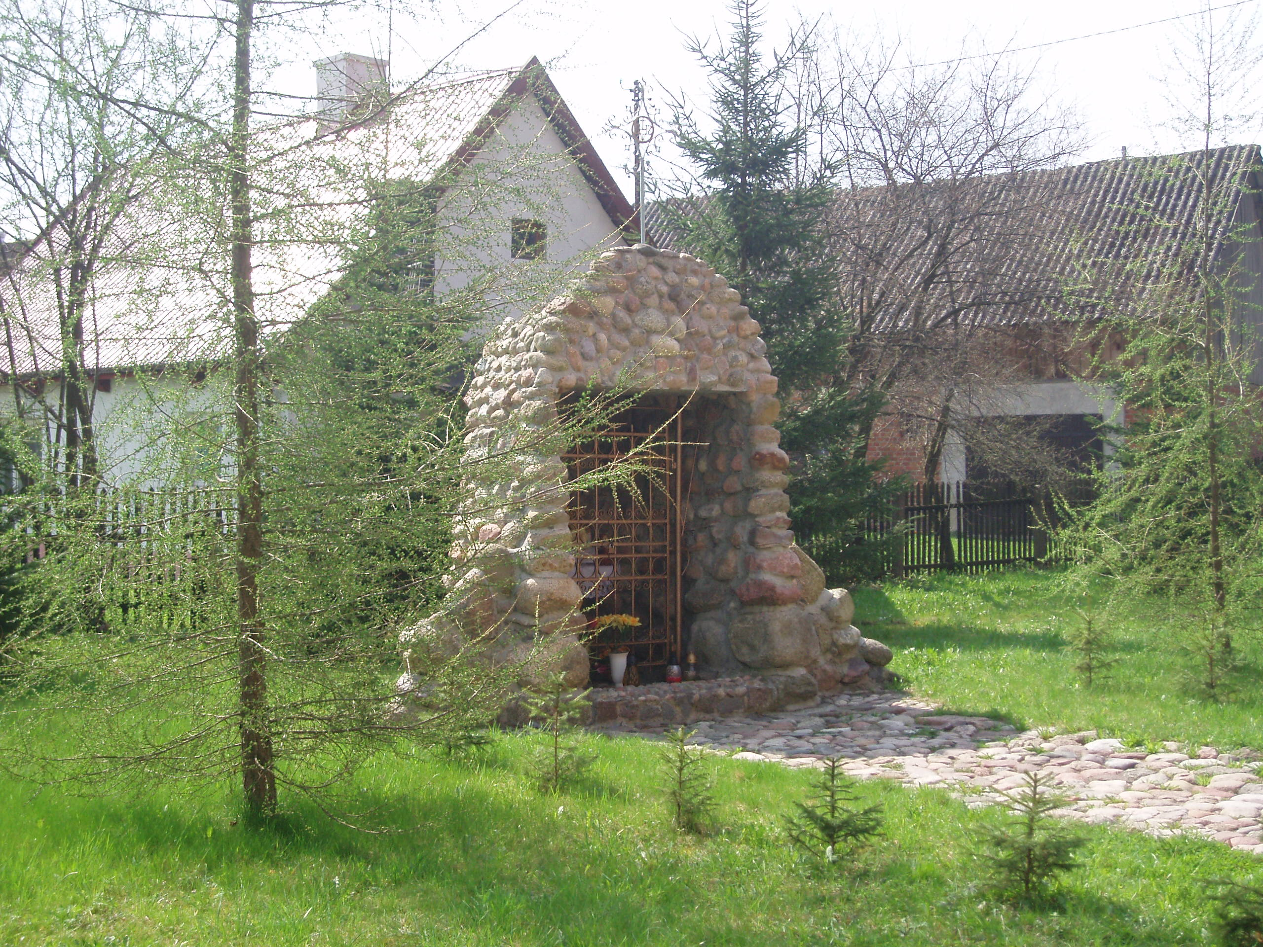 Kappliczka przed kościołem